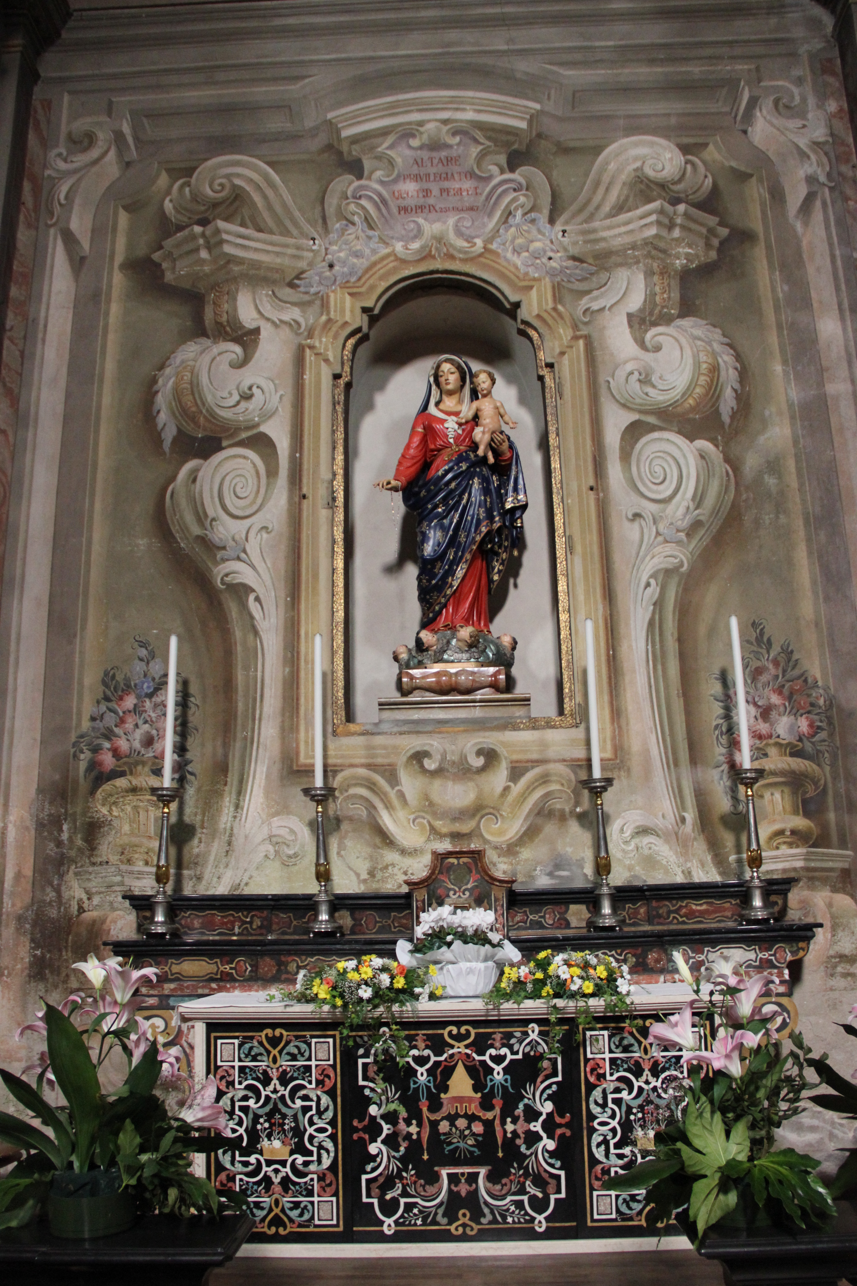 Plebana di Uggiate